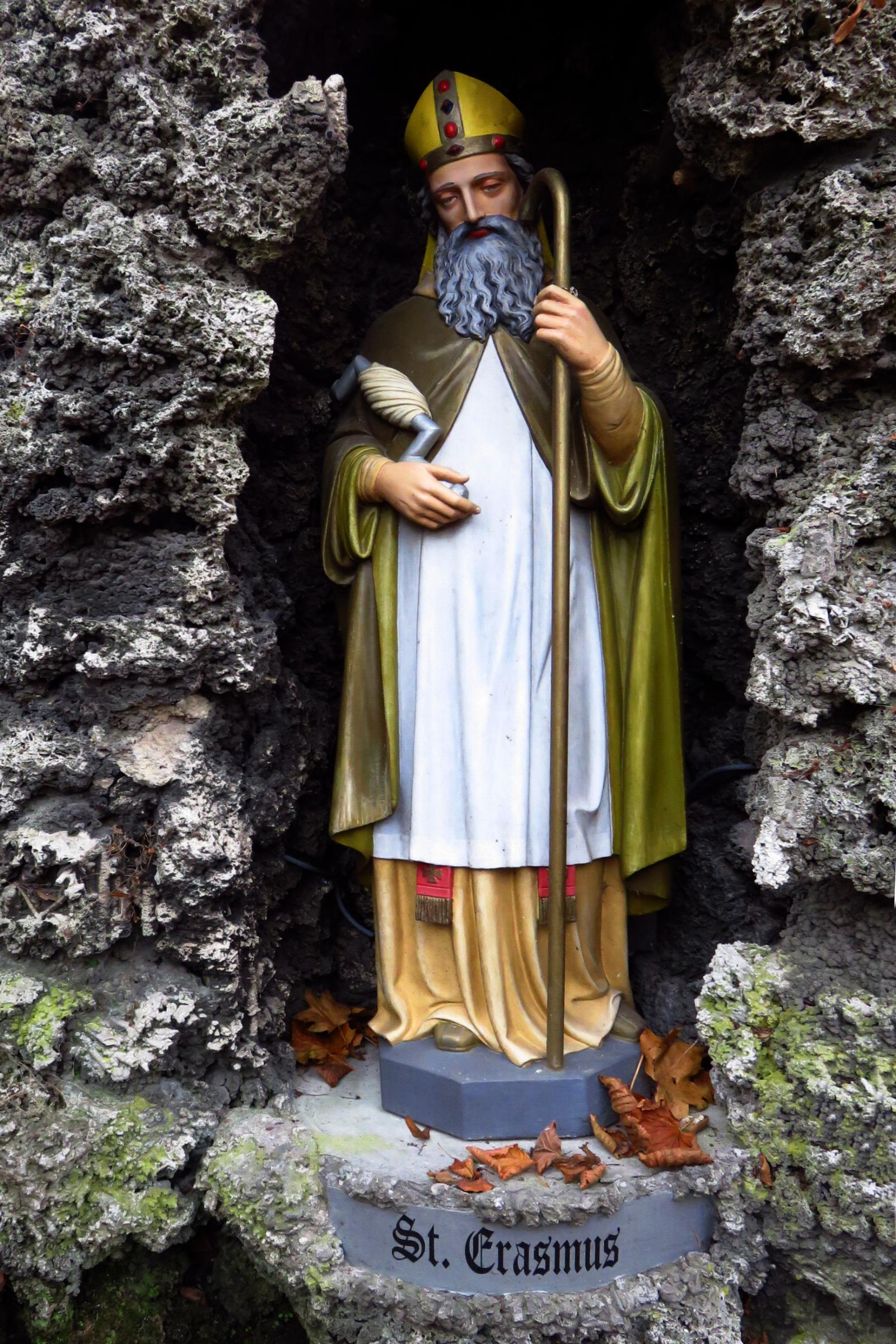 Grottenanlage in Hehn Heiligenpesch